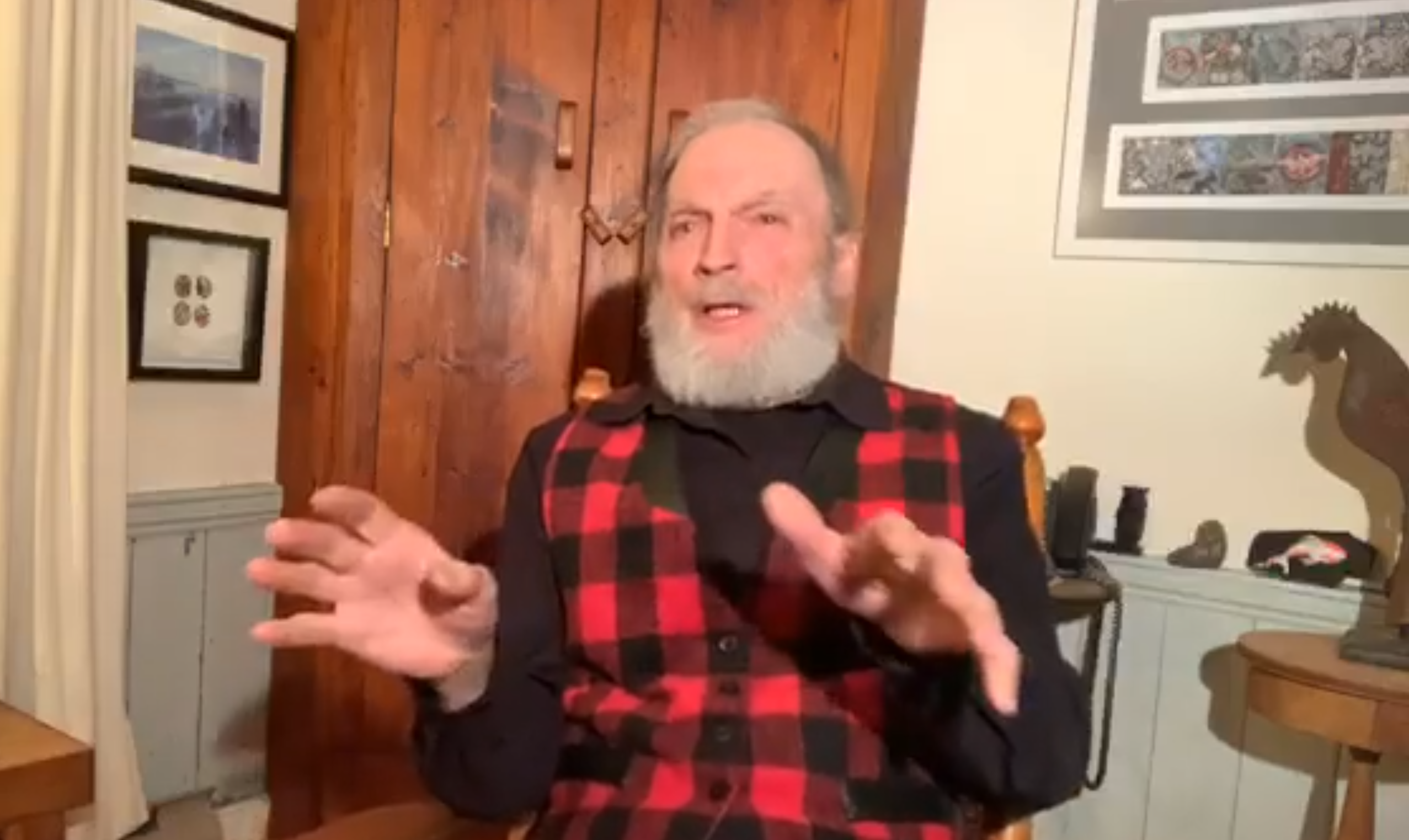 Jocelyn Bérubé en performance lors du Festival des Festivals Trad (en téléprésence) le 28 mars 2020.